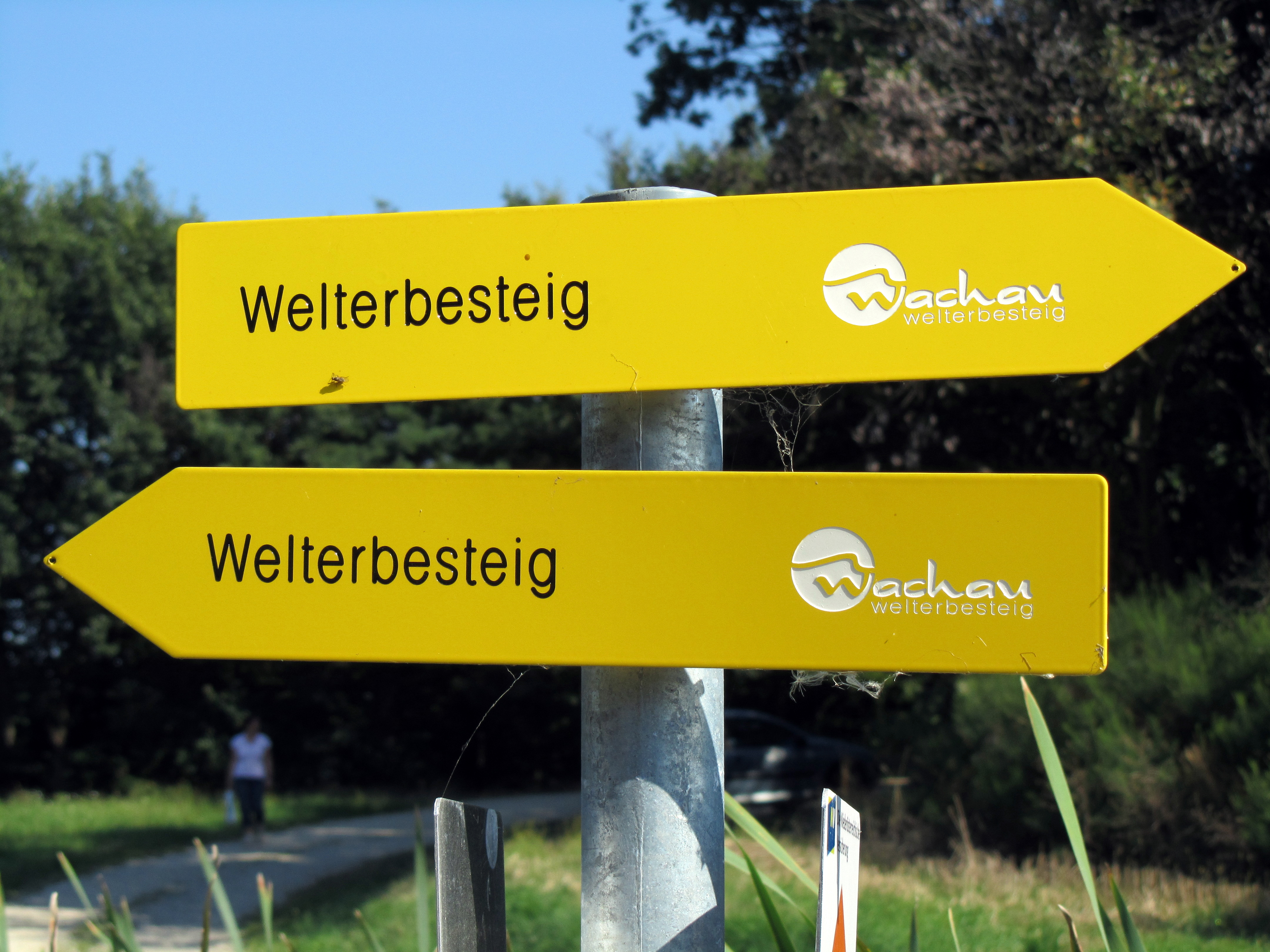 Wegweiser des Wanderwegs "Welterbesteig" in der Wachau, Österreich